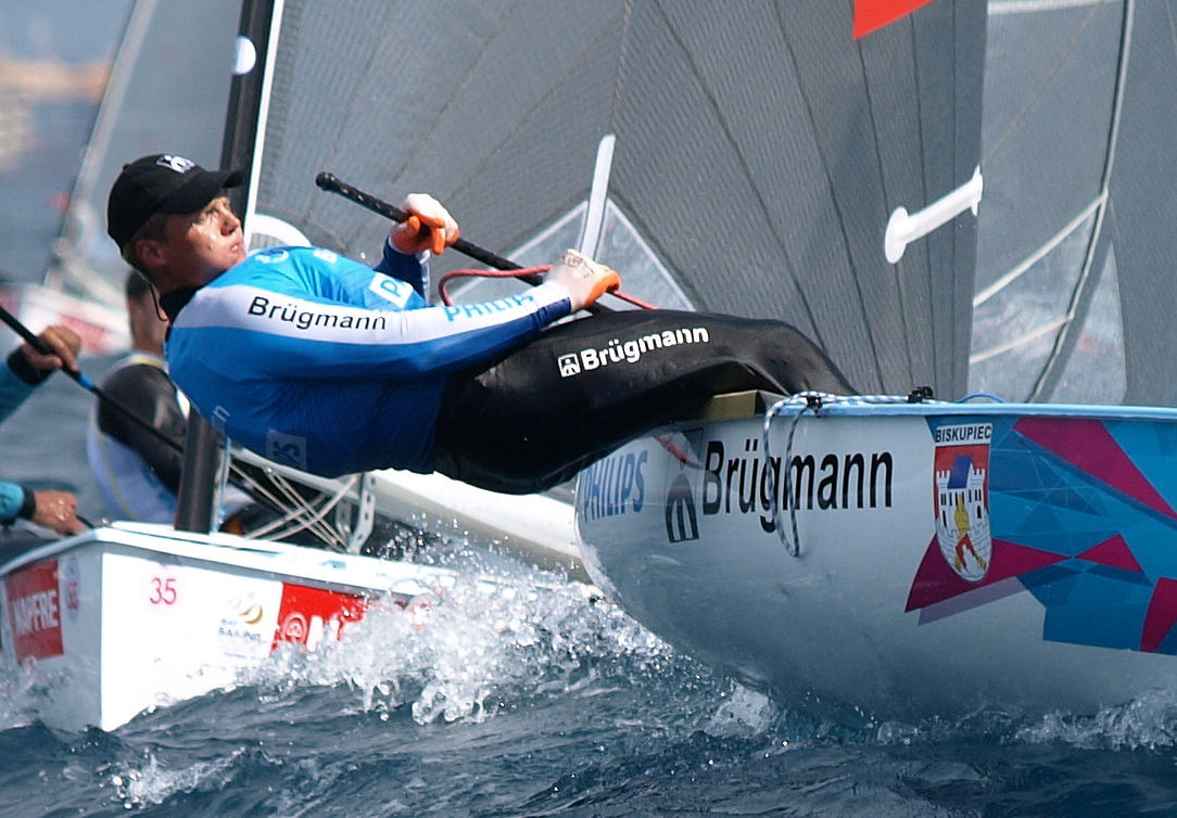 Fotografię wykonałem podczas regat: Trofeo Princes Sophia na wodach Zatoki Palma u wybrzeży Majorki